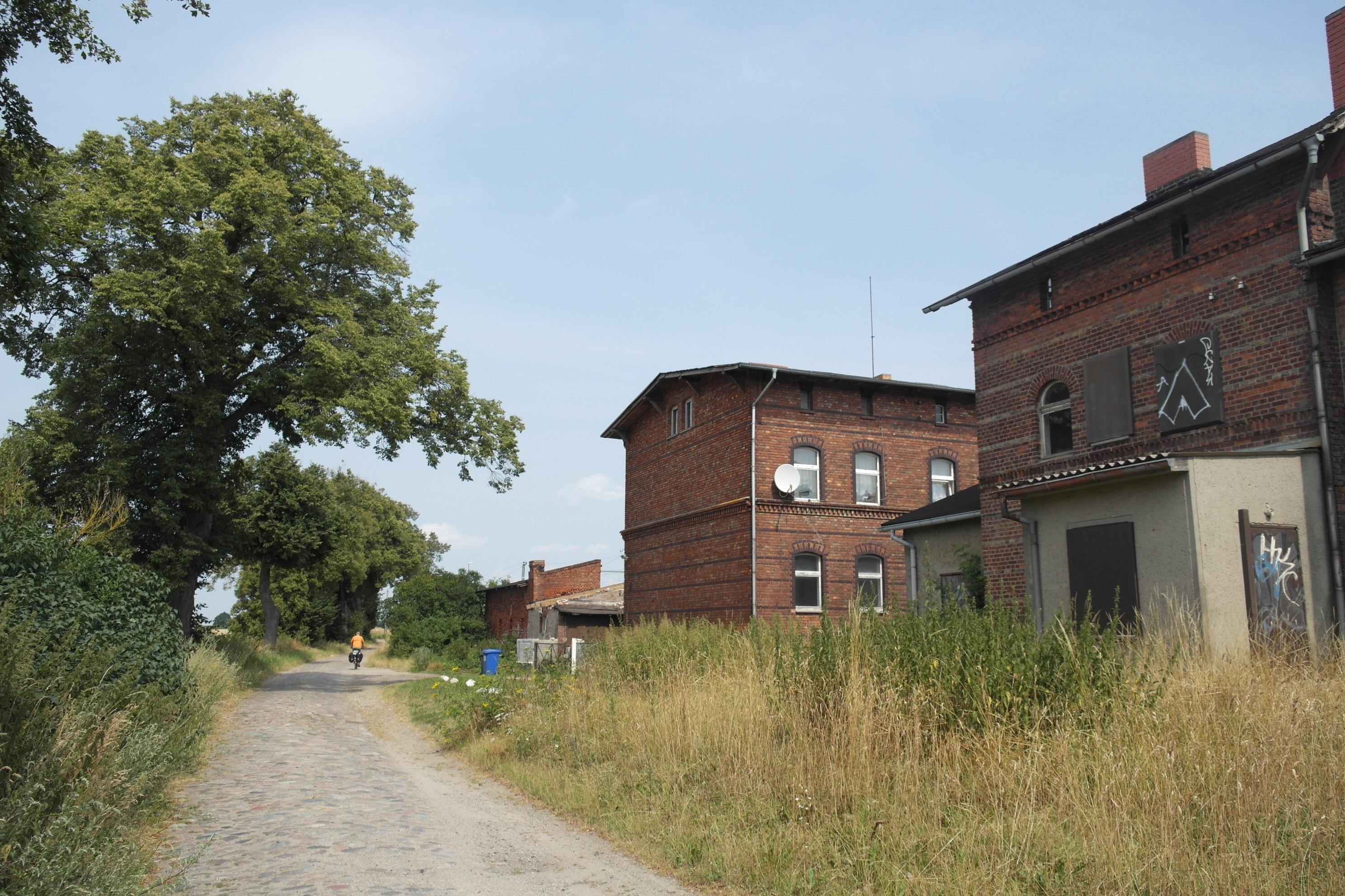 Bahnhof Sternfeld, Wohnhaus neben dem Bahnhof